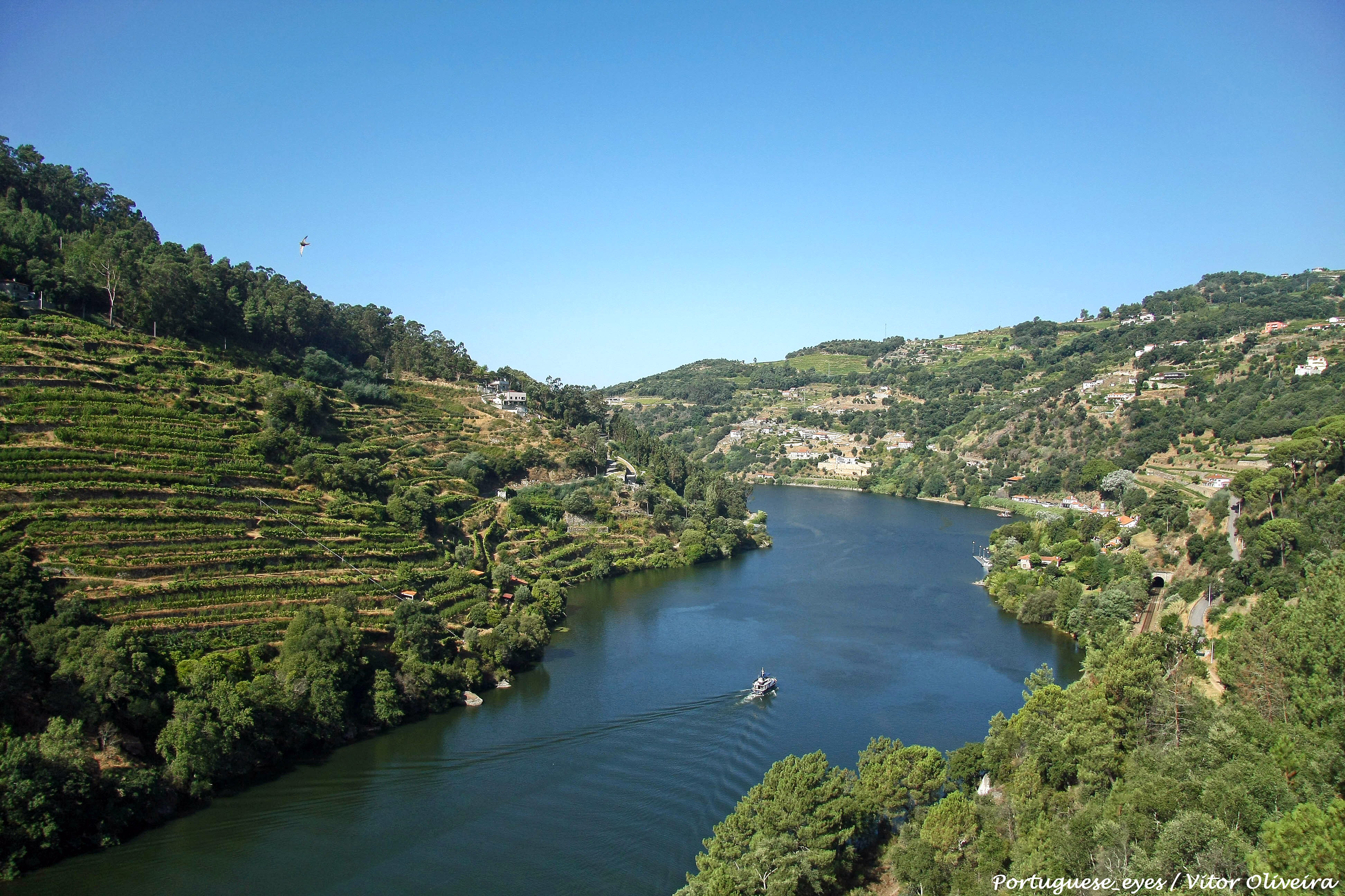 Rio Douro - Portugal 🇵🇹